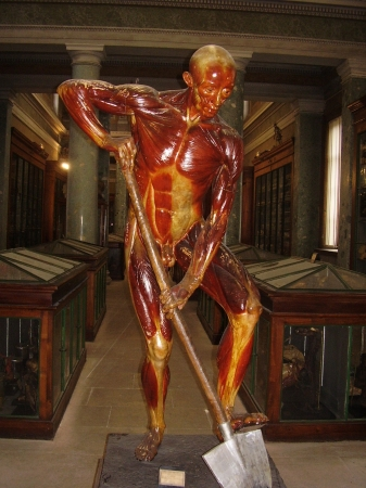 L'écorché d'Alphonse Lami (musée d'anatomie de Montpellier, Université Montpellier 1)